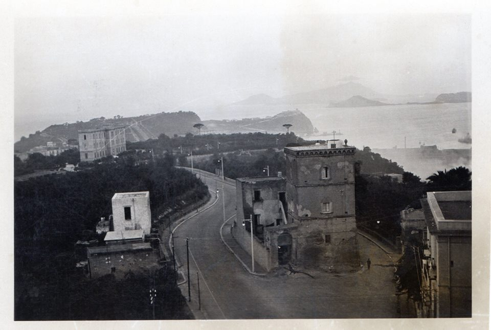 Napoli, Posillipo - In primo piano la Torre Ranieri; sullo sfondo Nisida, Capo Miseno, Ischia. Autore sconosciuto.